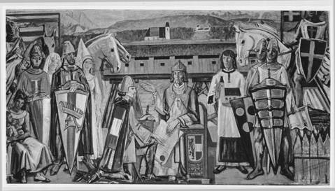 Wandbildnis der Grafen